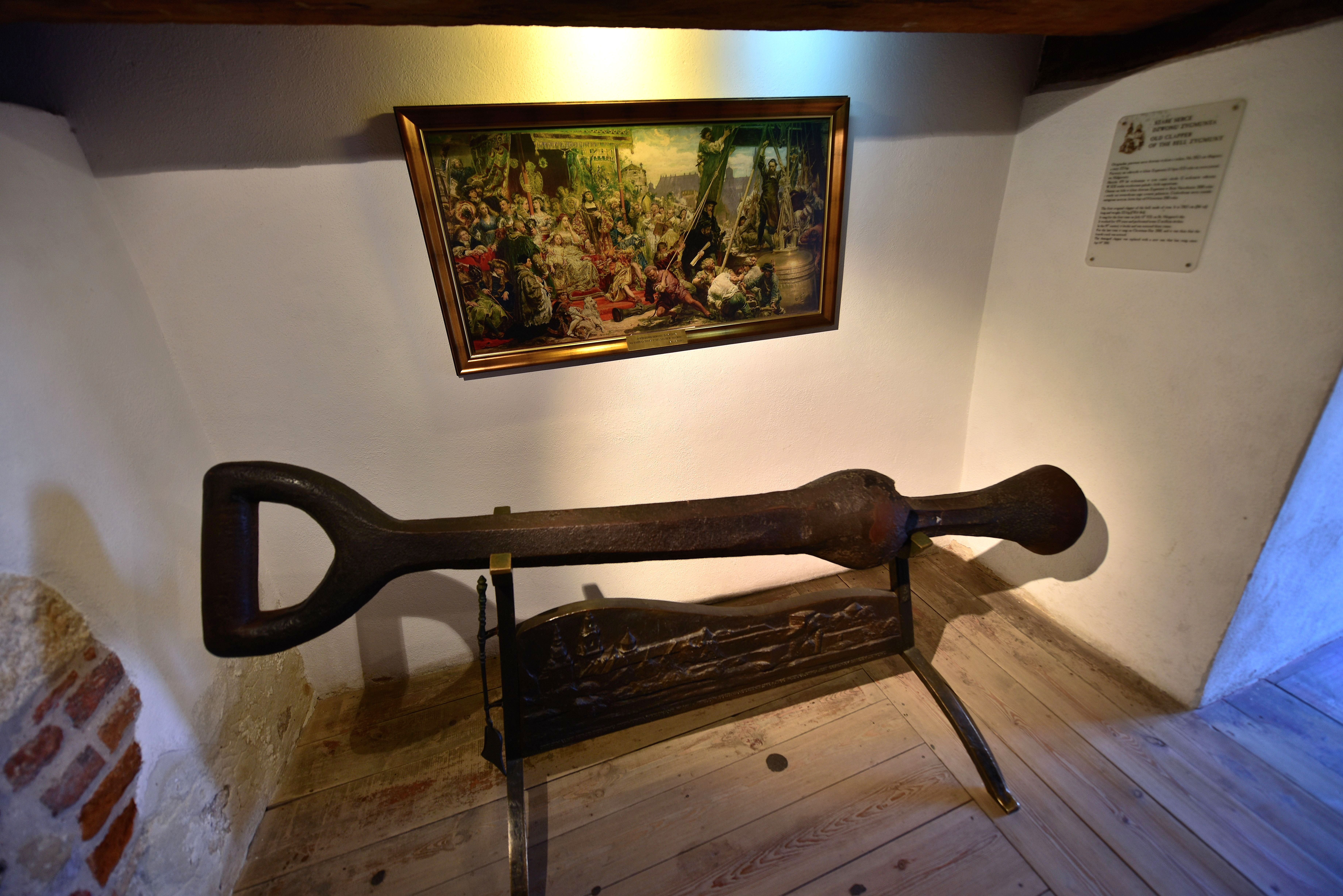 Stare serce Dzwonu Zygmunta na półpiętrze Wieży Zygmuntowskiej na Wawelu